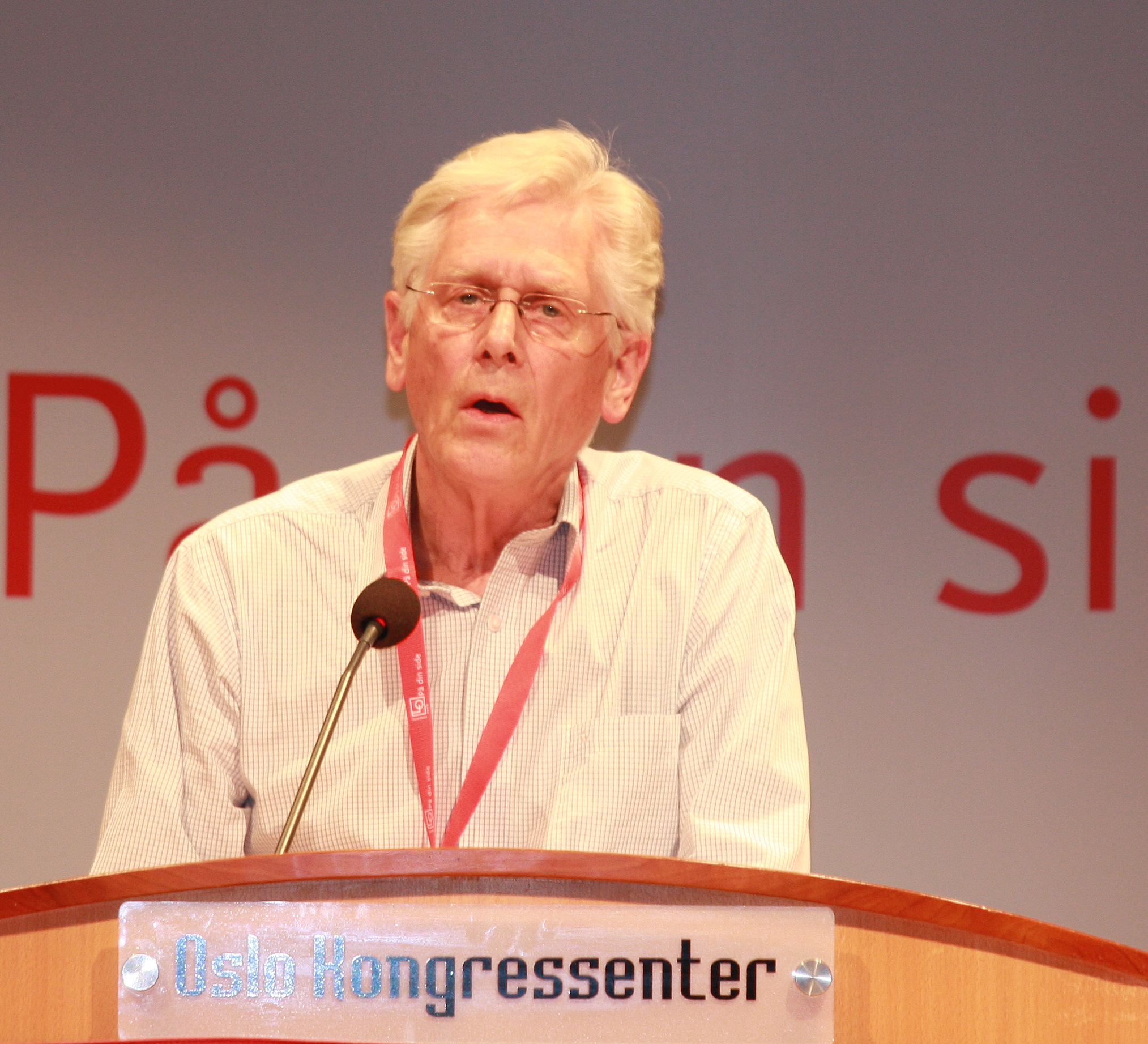 Kleiv Fiskvik